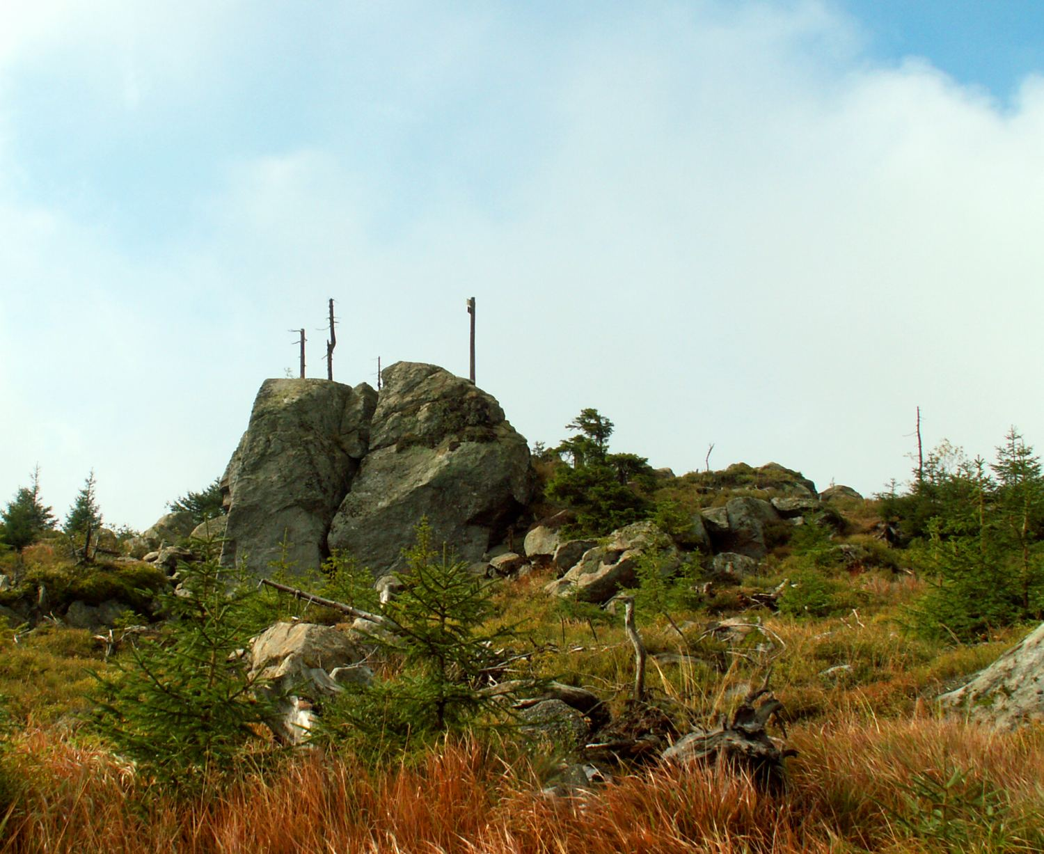 vlastní foto - vrchol hory Oblík na Šumavě